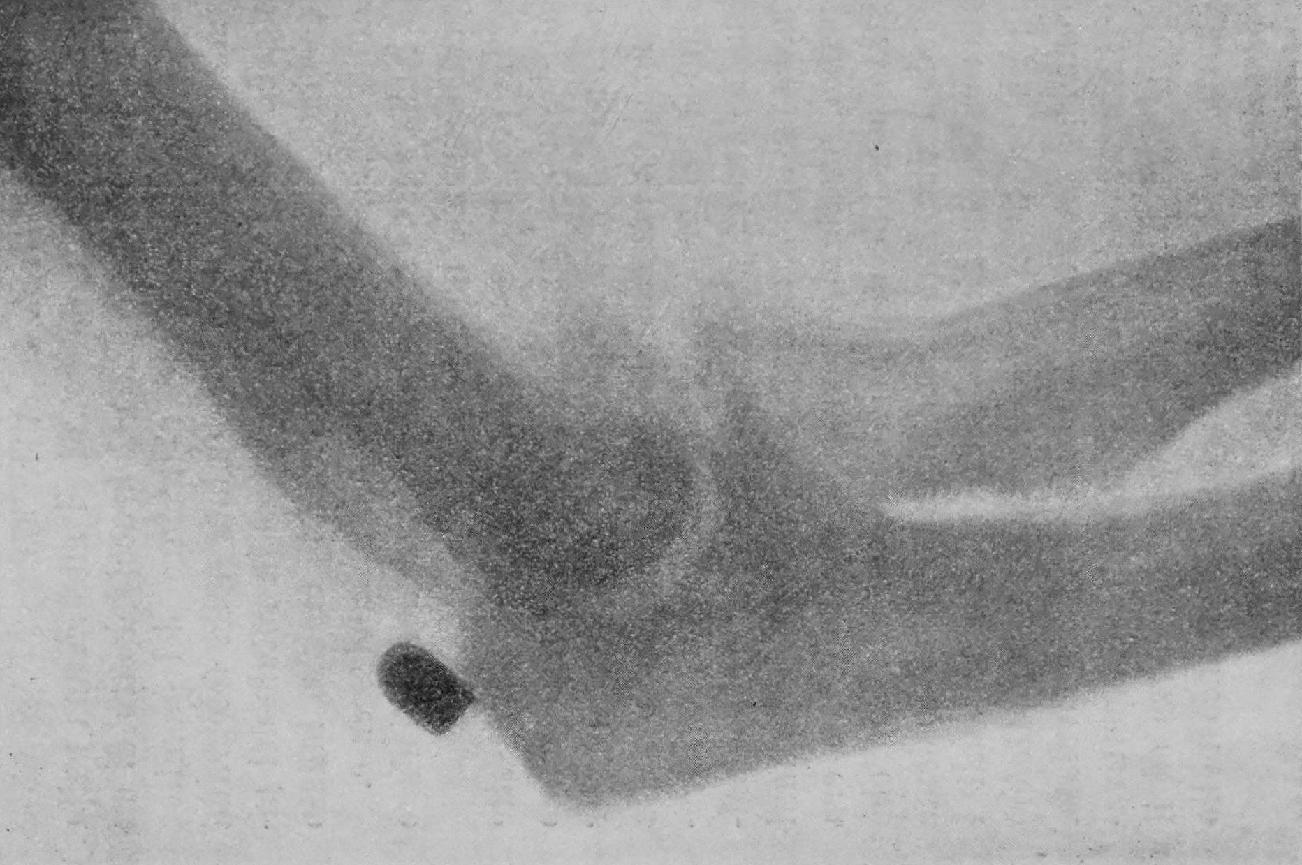 Palla di revolver conficcata nel braccio destro di un adulto nella regione articolare del gomito